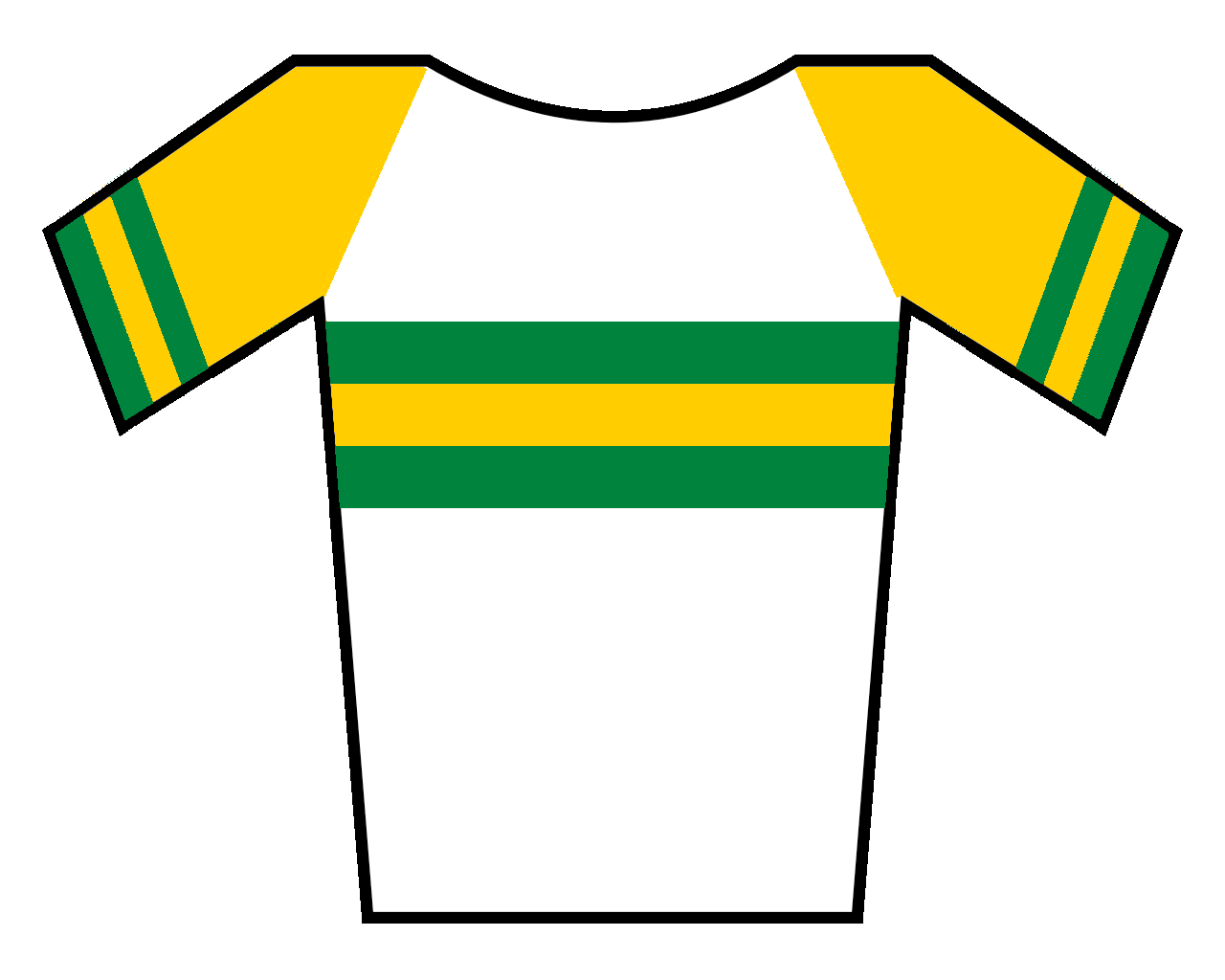 Maillot de Australia